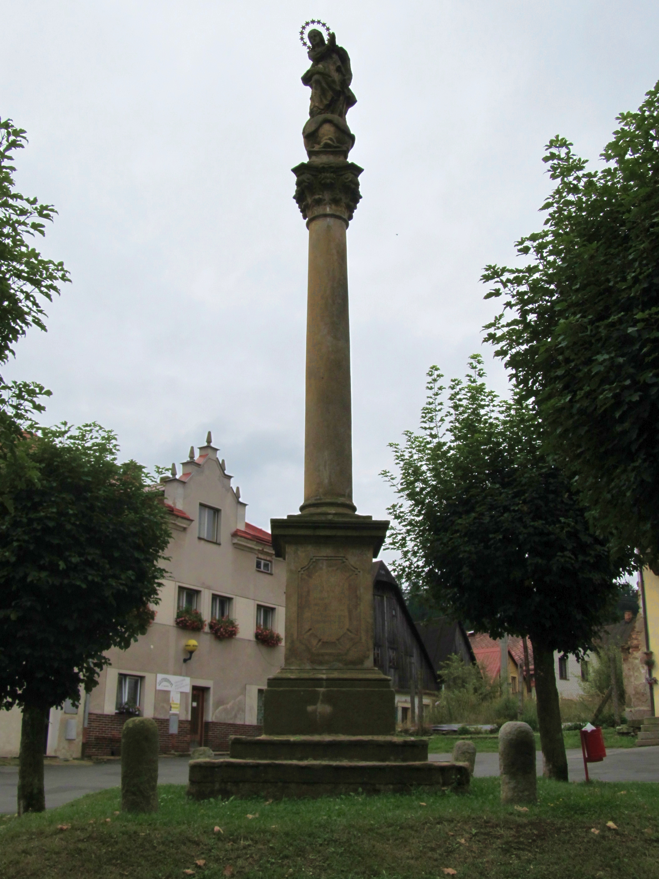 Sloup se sochou P. Marie (Stárkov), nám., Stárkov